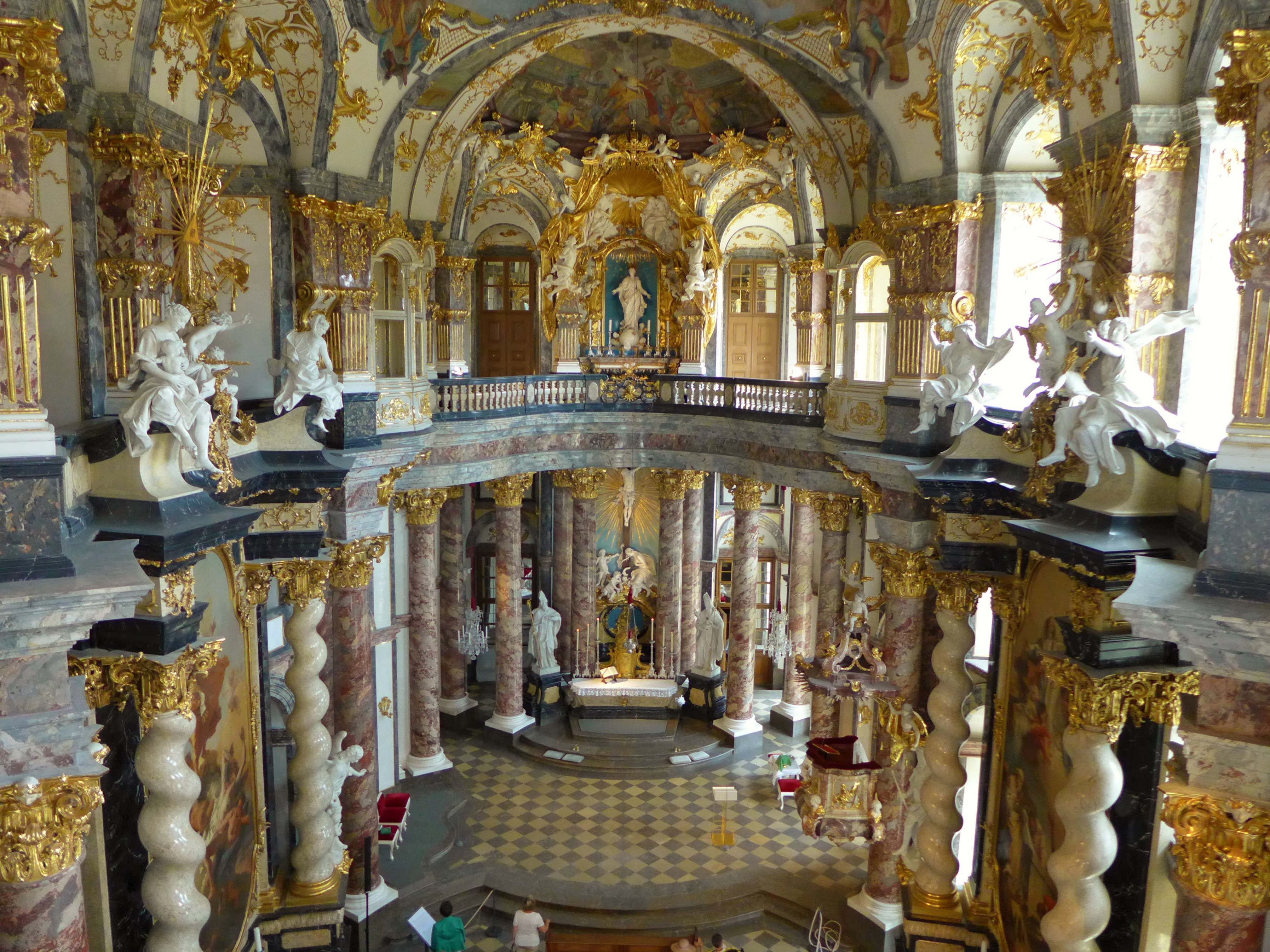 Hofkirche in Würzburg, Blick von der Empore